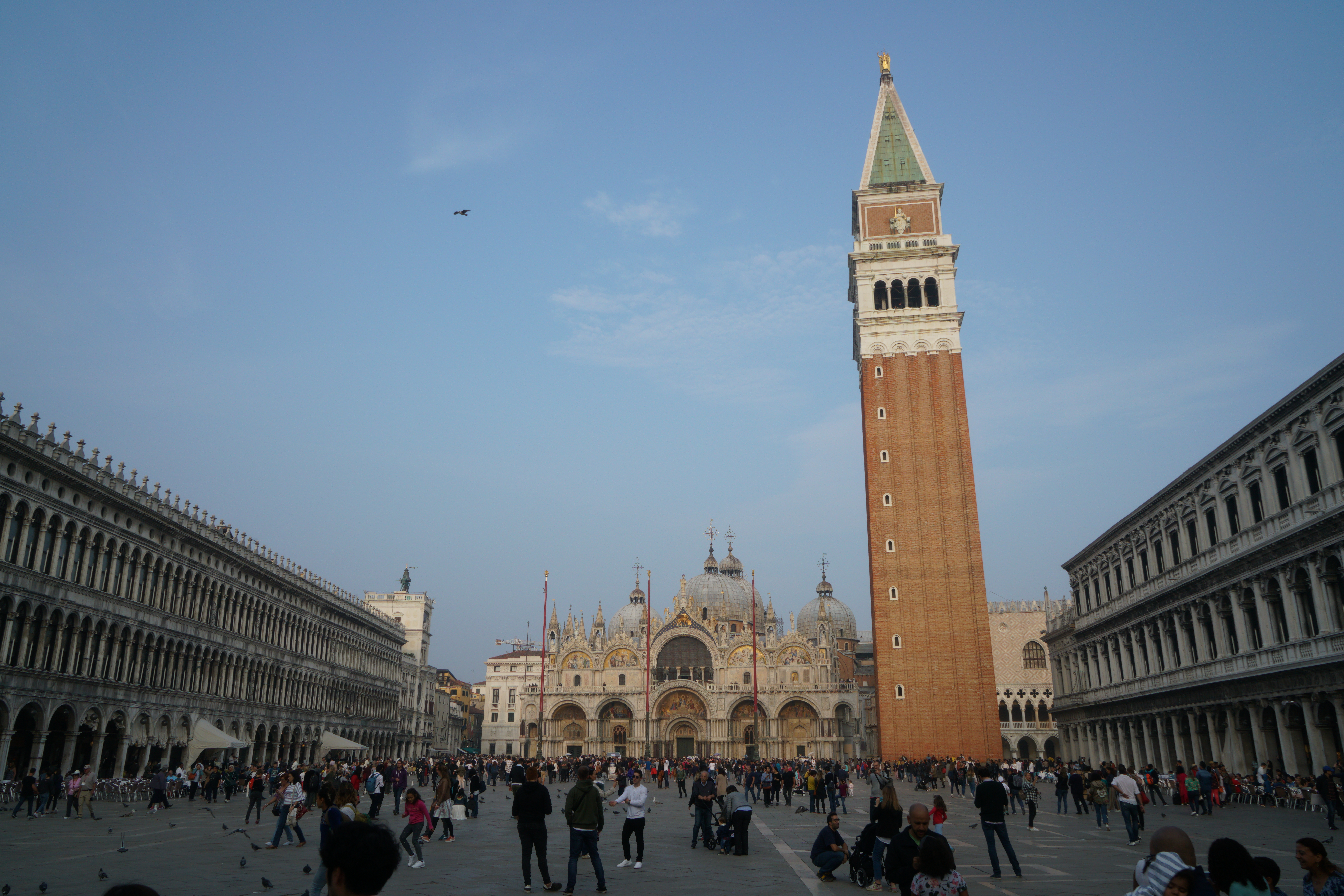 Piazza San Marco